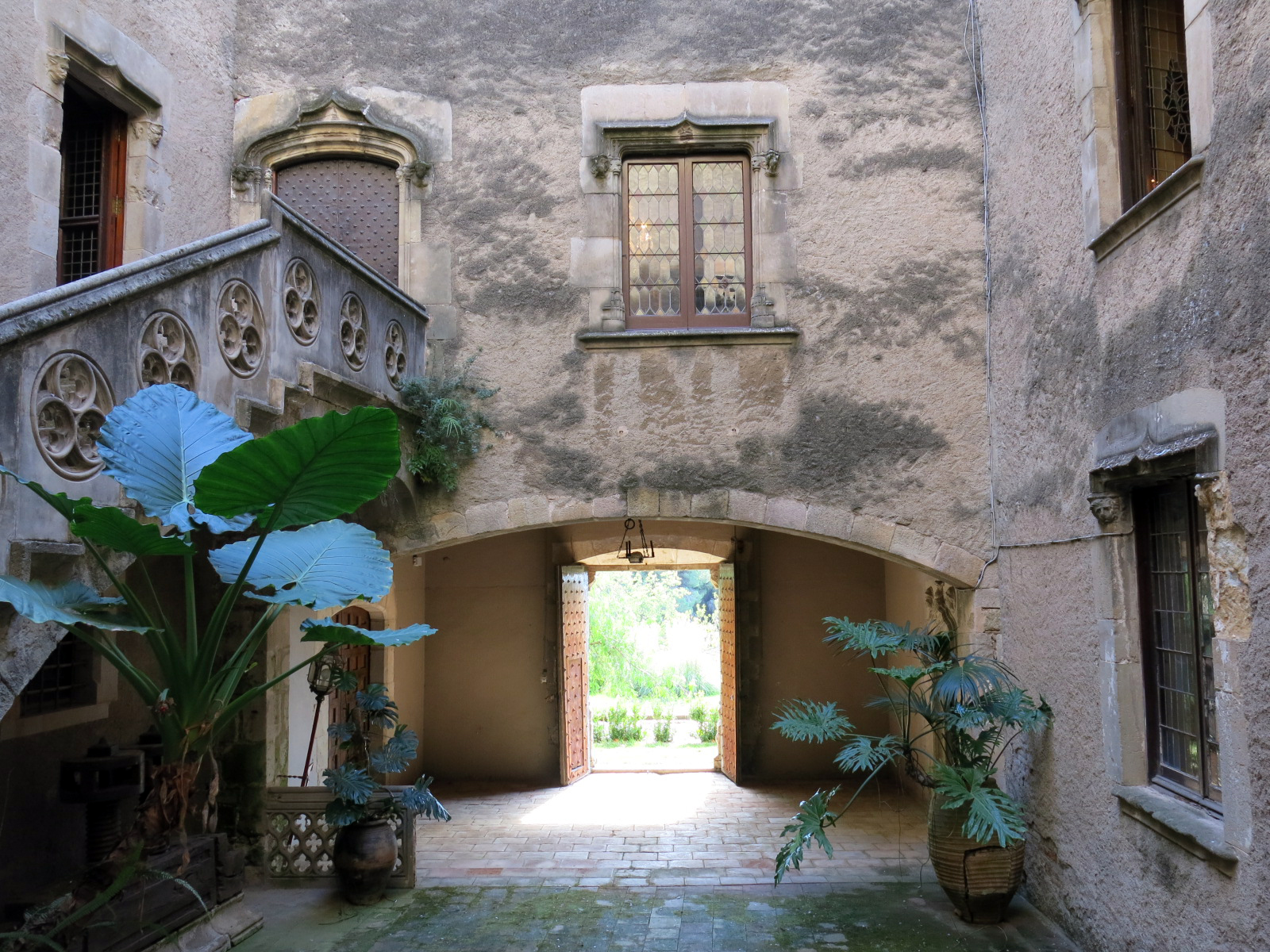 Torre Pallaresa (Santa Coloma de Gramenet)